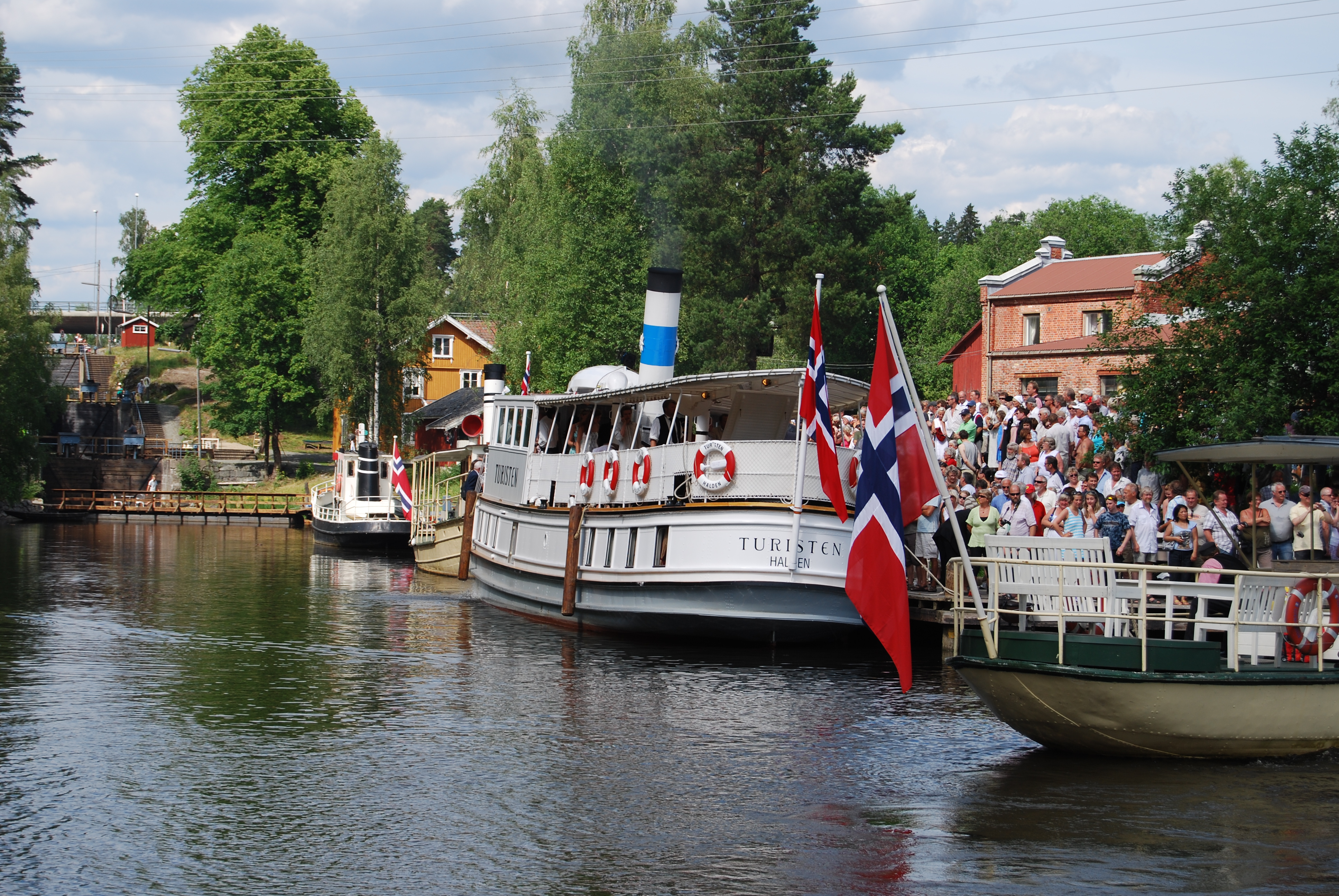 DS Turisten